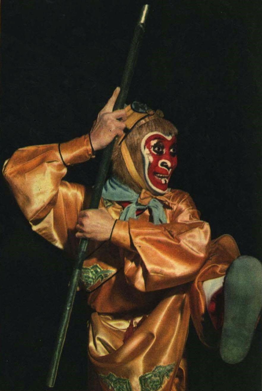 1962-01 1962年 浙江绍剧 孙悟空